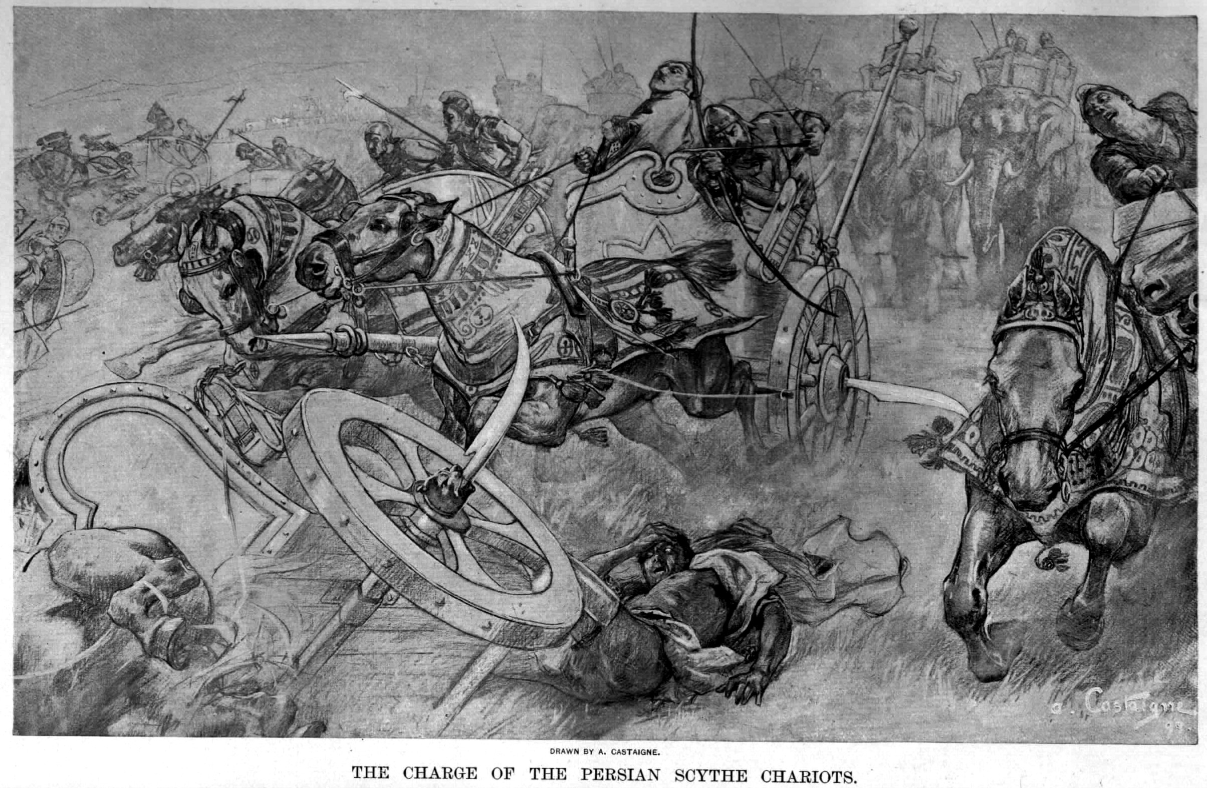 Alexander old drawings